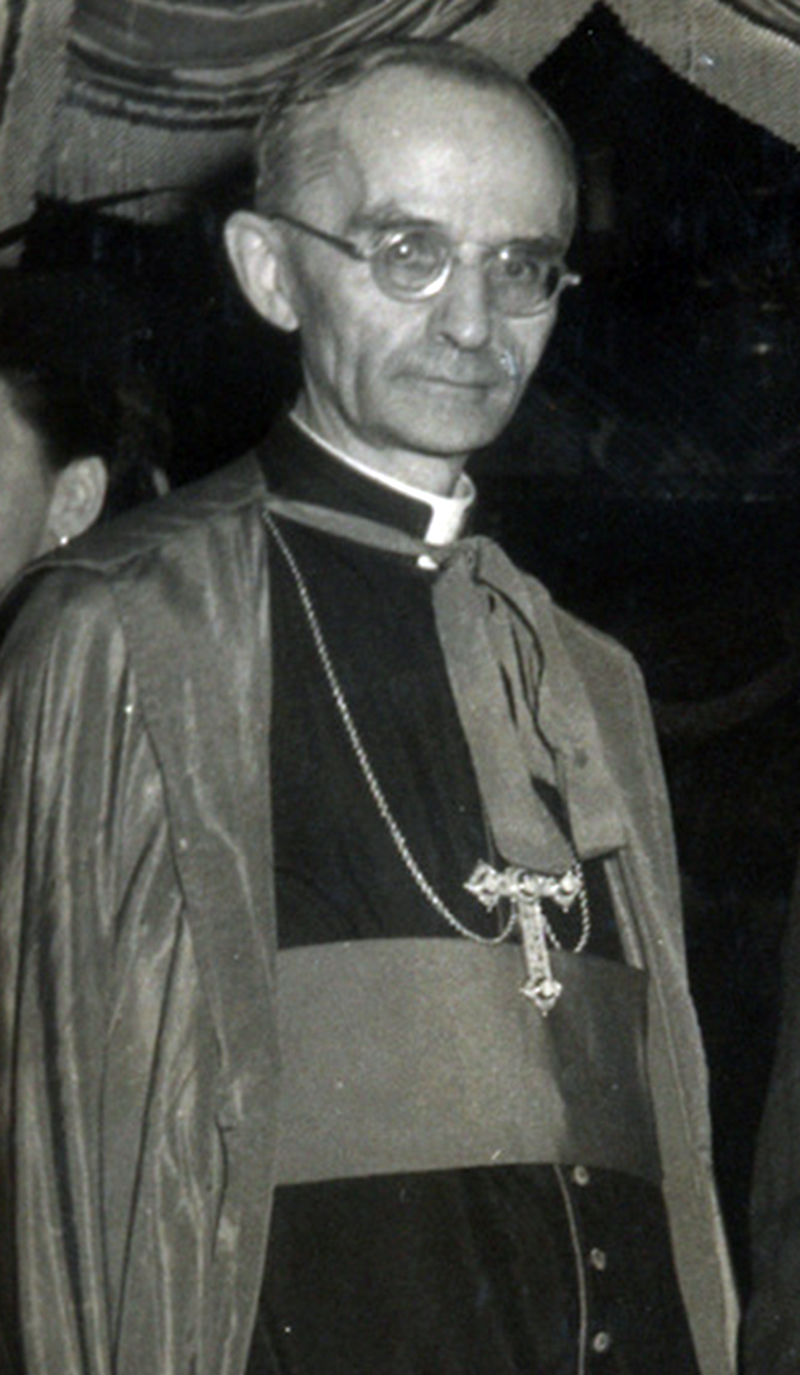 Foto de Mons. Ricardo Pittini. Digitalización.